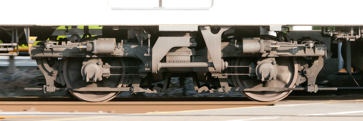 東武8000系の住友金属FS396形台車。